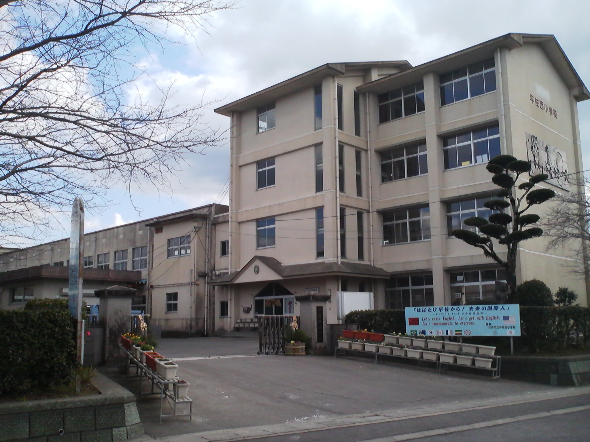 薩摩川内市立平佐西小学校の外観。